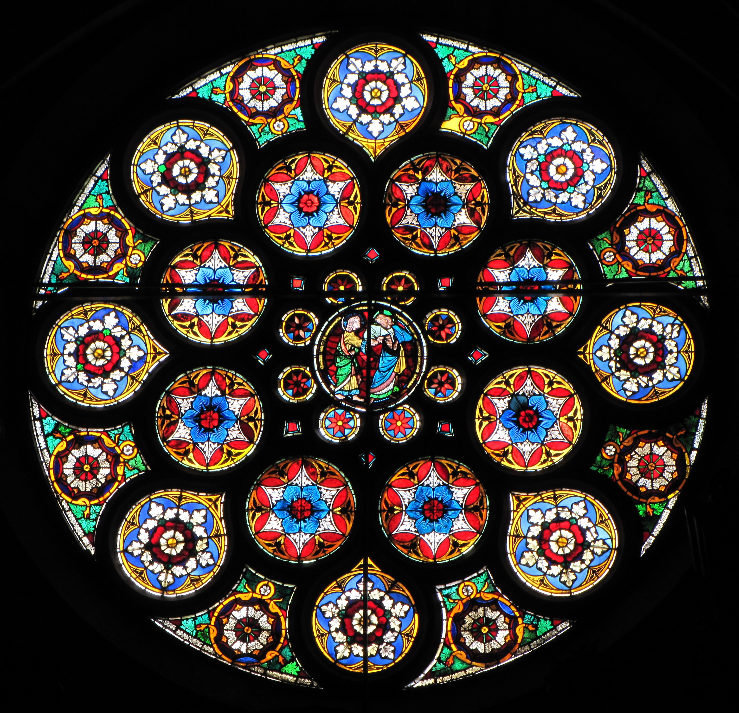 Alsace, Bas-Rhin, Église protestante Saint-Thomas de Strasbourg, 4 rue Martin-Luther (PA00085032).Rosace gothique de la façade occidentale (XIIIe-XIXe)